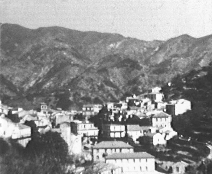 Pazzano panorama (1965)